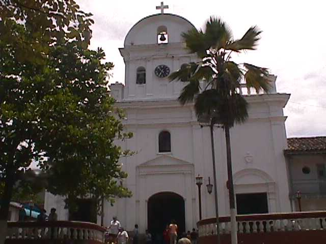 Iglesia de San Jerónimo. Antioquia, Colombia.